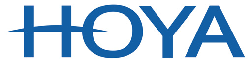 Logo Hoya